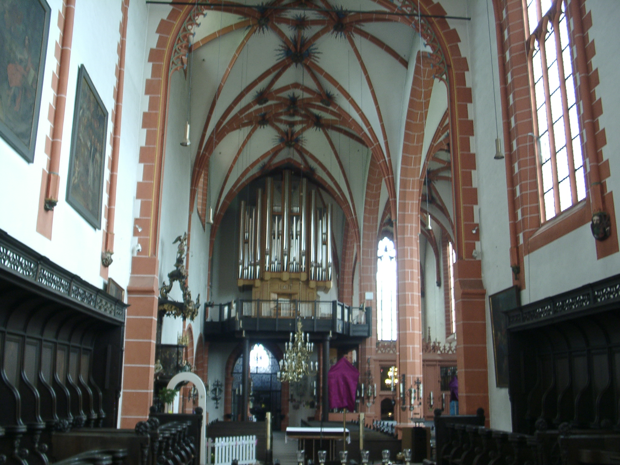 Wallfahrtskirche Klausen